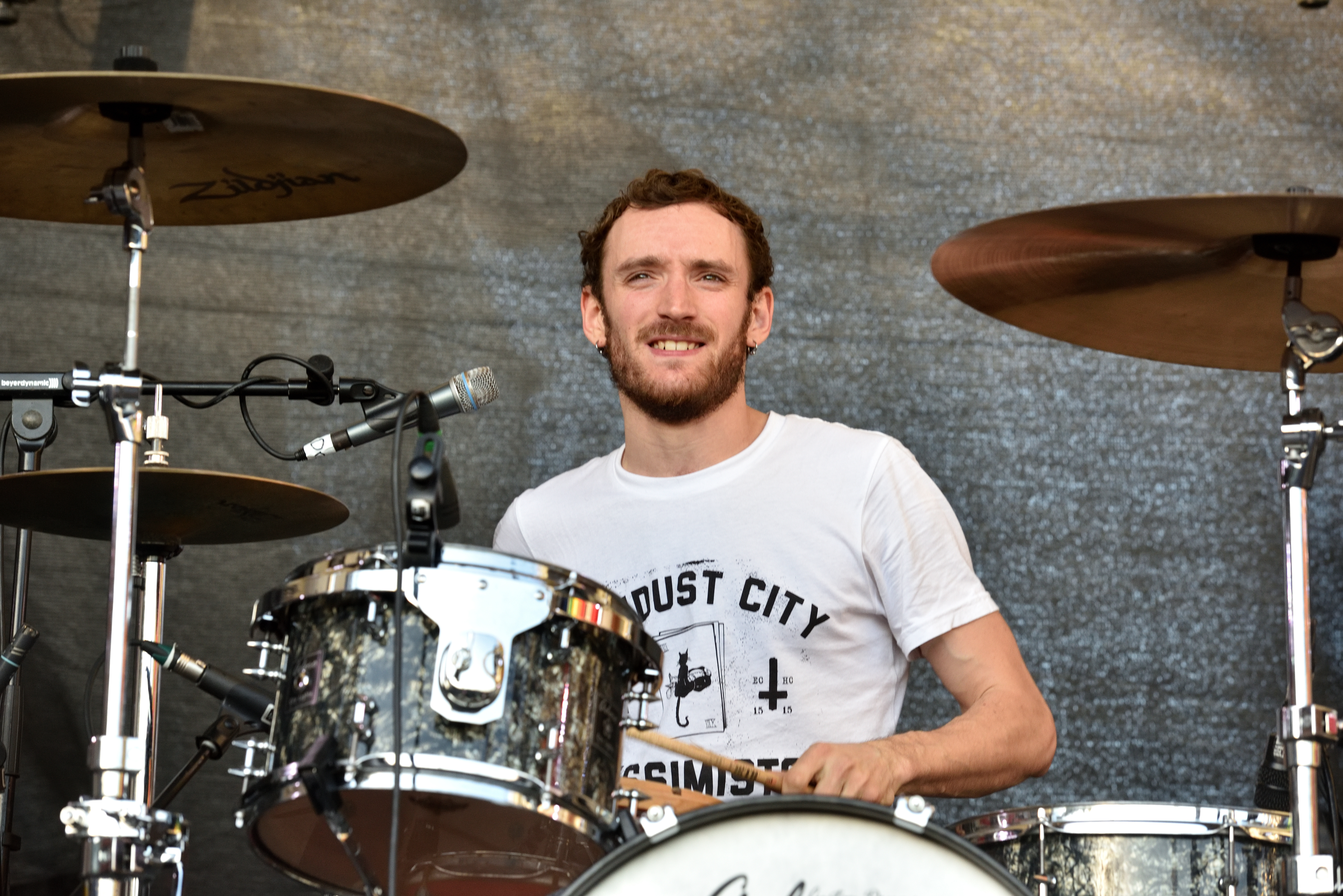 Guerilla Poubelle beim Hafen Rock 2016 in Hamburg